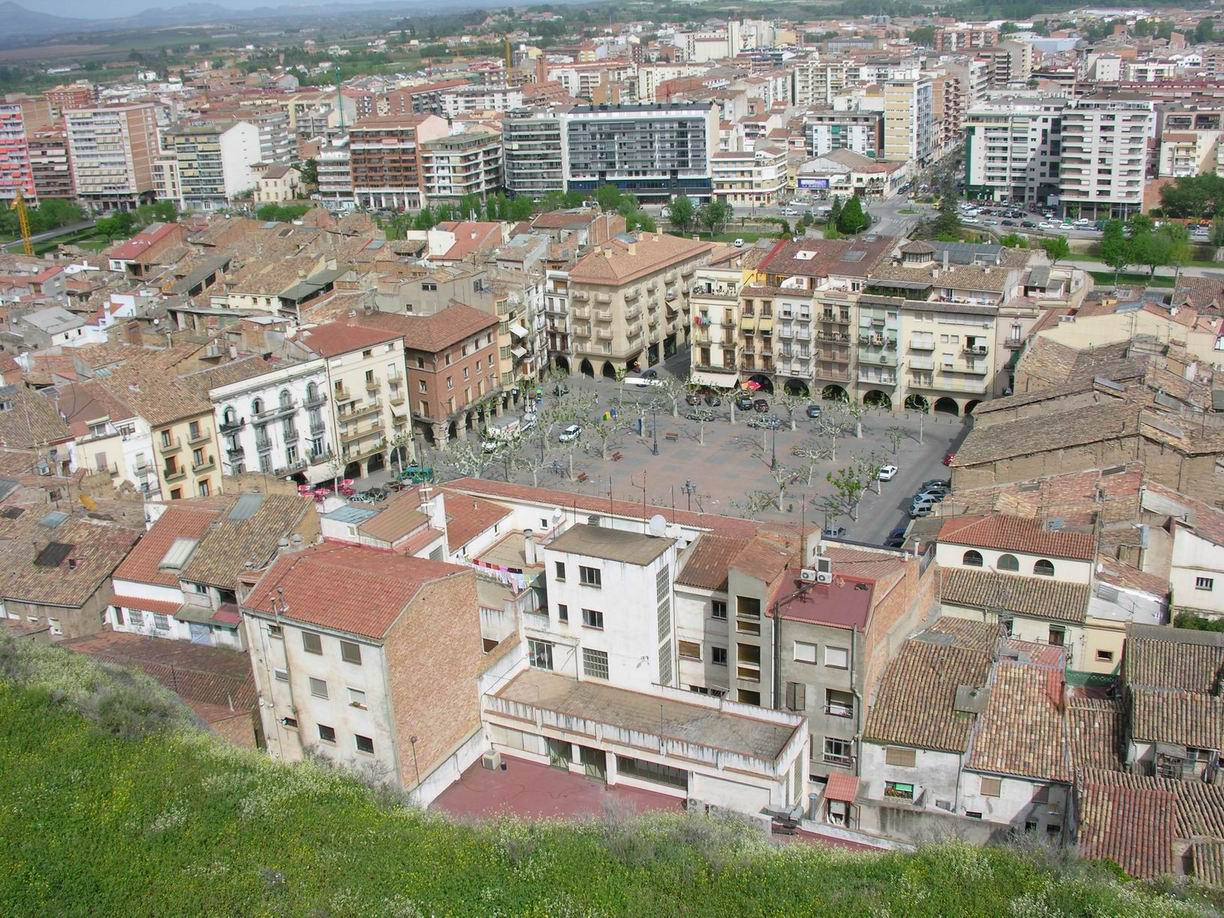 Plaça del Mercadal de Balaguer, La Noguera, Catalunya